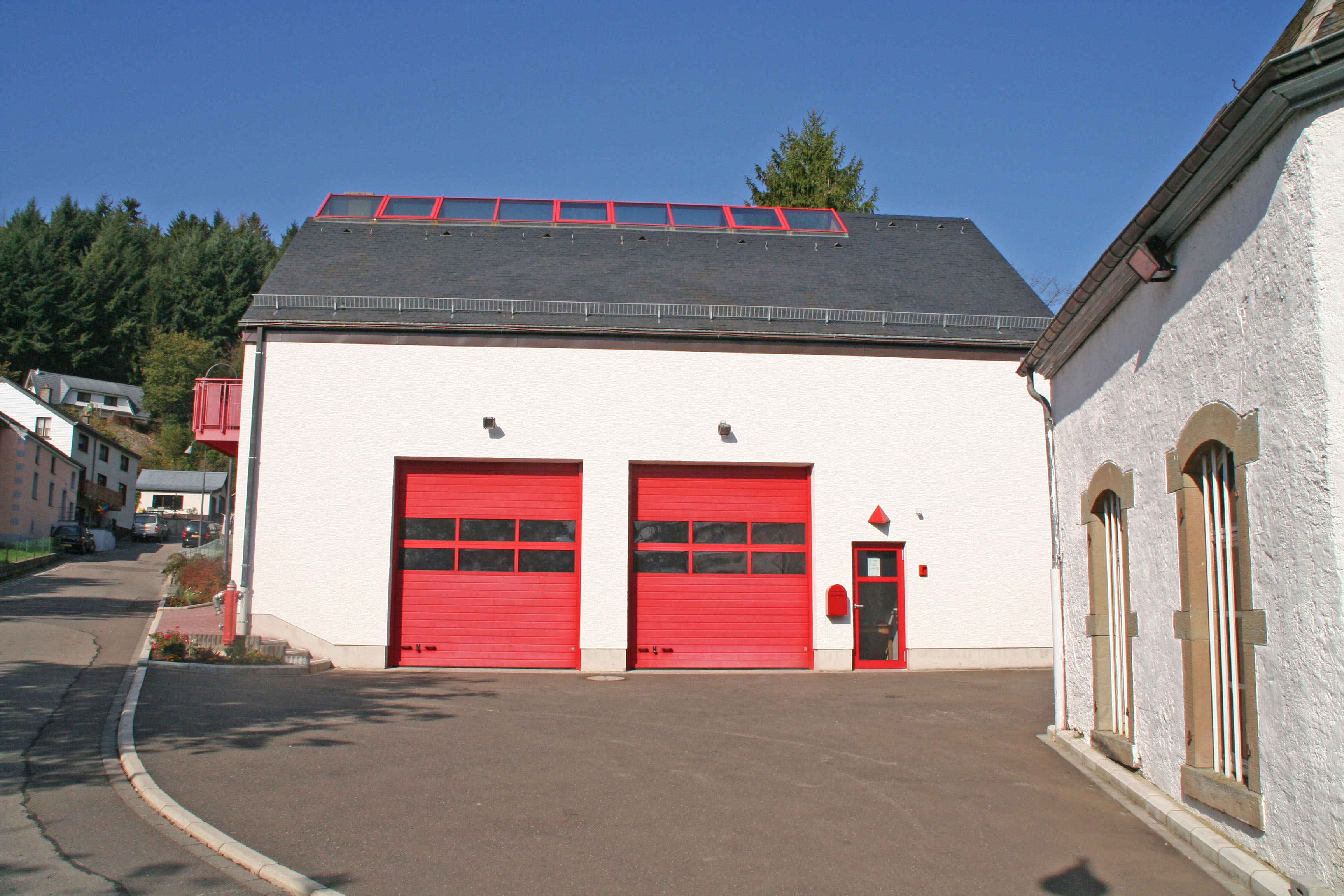 Pompjeesbau zu Äischer.